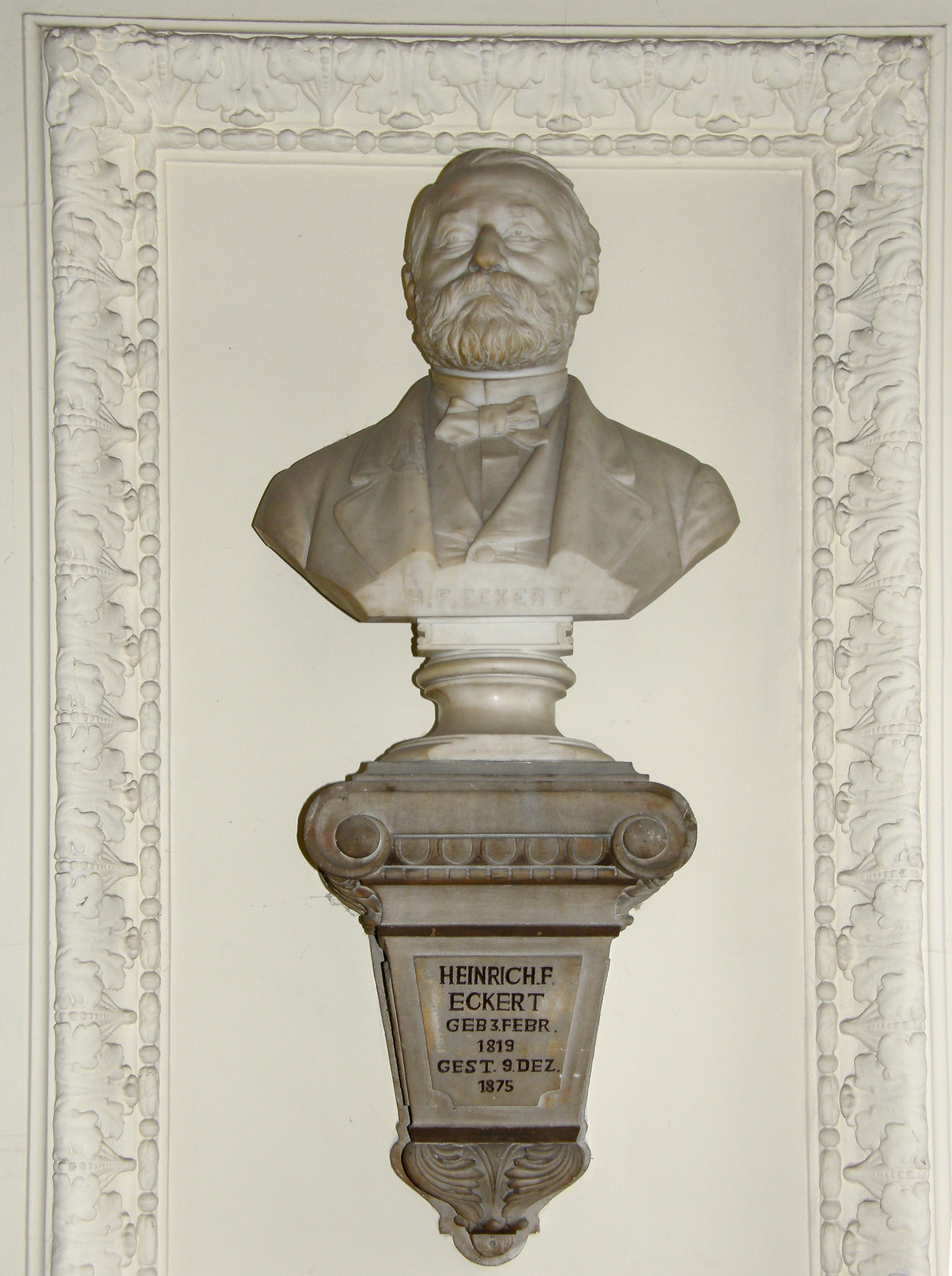 Berlin-Mitte, Landwirtschaftliche Fakultät der HU, öffentlich zugängiges Foyer. Büste des Landmaschinenfabrikanten Heinrich Ferdinand Eckert